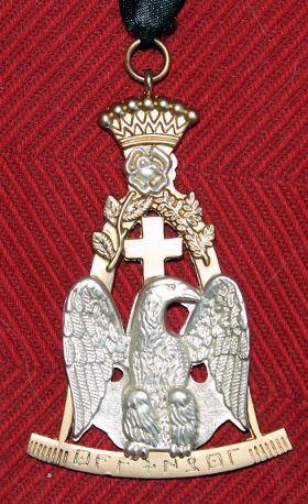 Anvers d'un bijoux du 4e Ordre du RFM